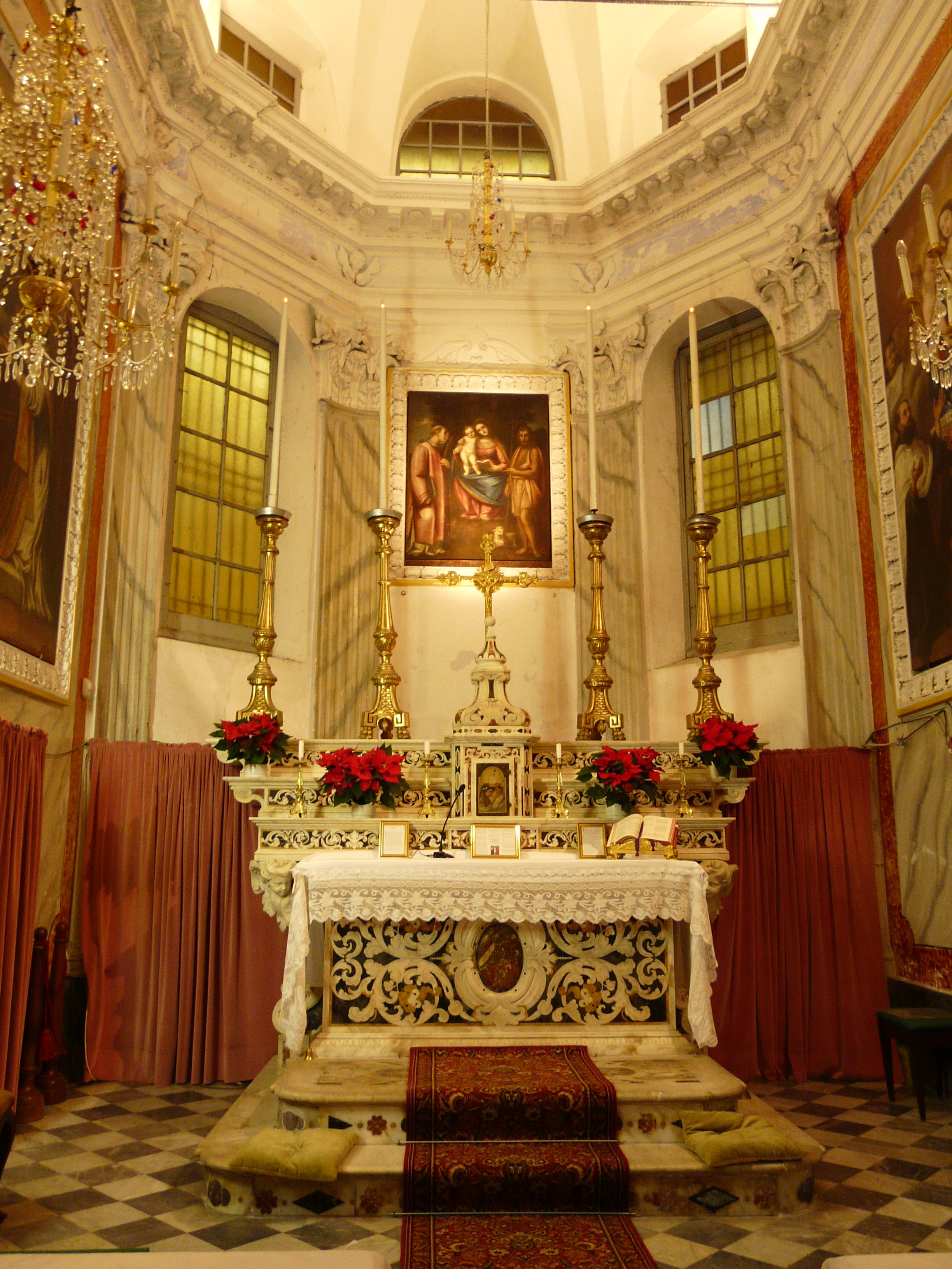 Altare maggiore dell'oratorio dei Bianchi, Rapallo, Liguria, Italia